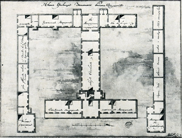 М.О. Львов проект Училища: проект Училища землебитного будівництва